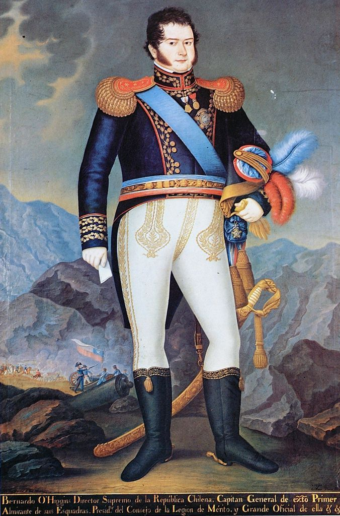 Retrato de Don Bernardo O'Higgins. Oleo sobre tela del pintor limeño José Gil de Castro (1785-1850) Colección: Museo Histórico Nacional de Chile.